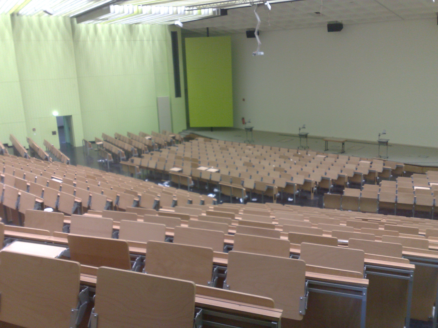 Der größte Hörsaal der TU Darmstadt (Auditorium Maximum, kurz: Audimax) mit der Raumnummer (S1/01/A1).